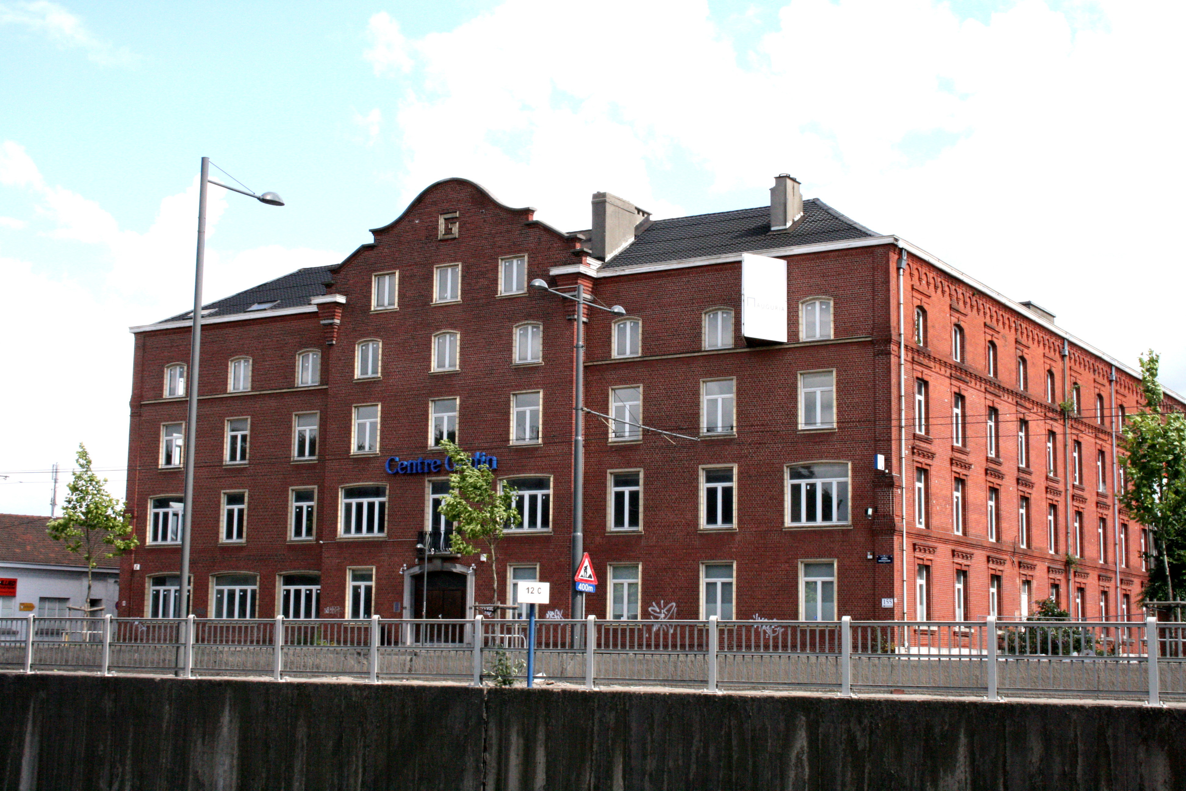 155 quai des Usines, Laeken (Bruxelles), Belgique. Centre Godin. Ancienne annexe du Familistère de Guise